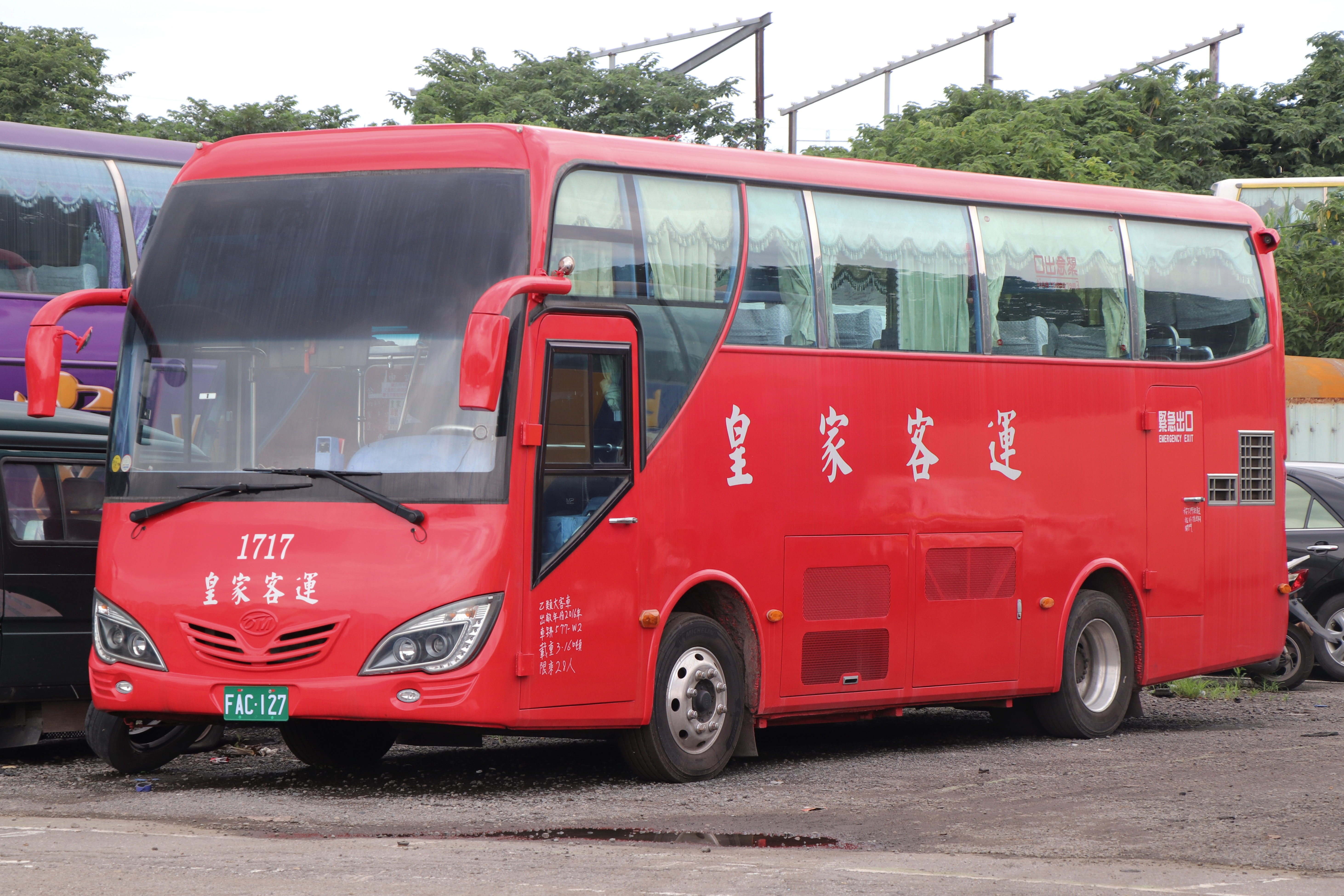 皇家客運 廈門金龍 JMH90T大客車 FAC-127